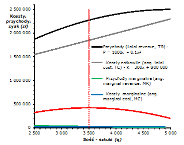 Schemat przedstawiający poziom optymalny zysku dla funkcji kosztów f(y) K = 300x + 800 000 oraz funkcji przychodów f(y) P = 1000x – 0,1x².